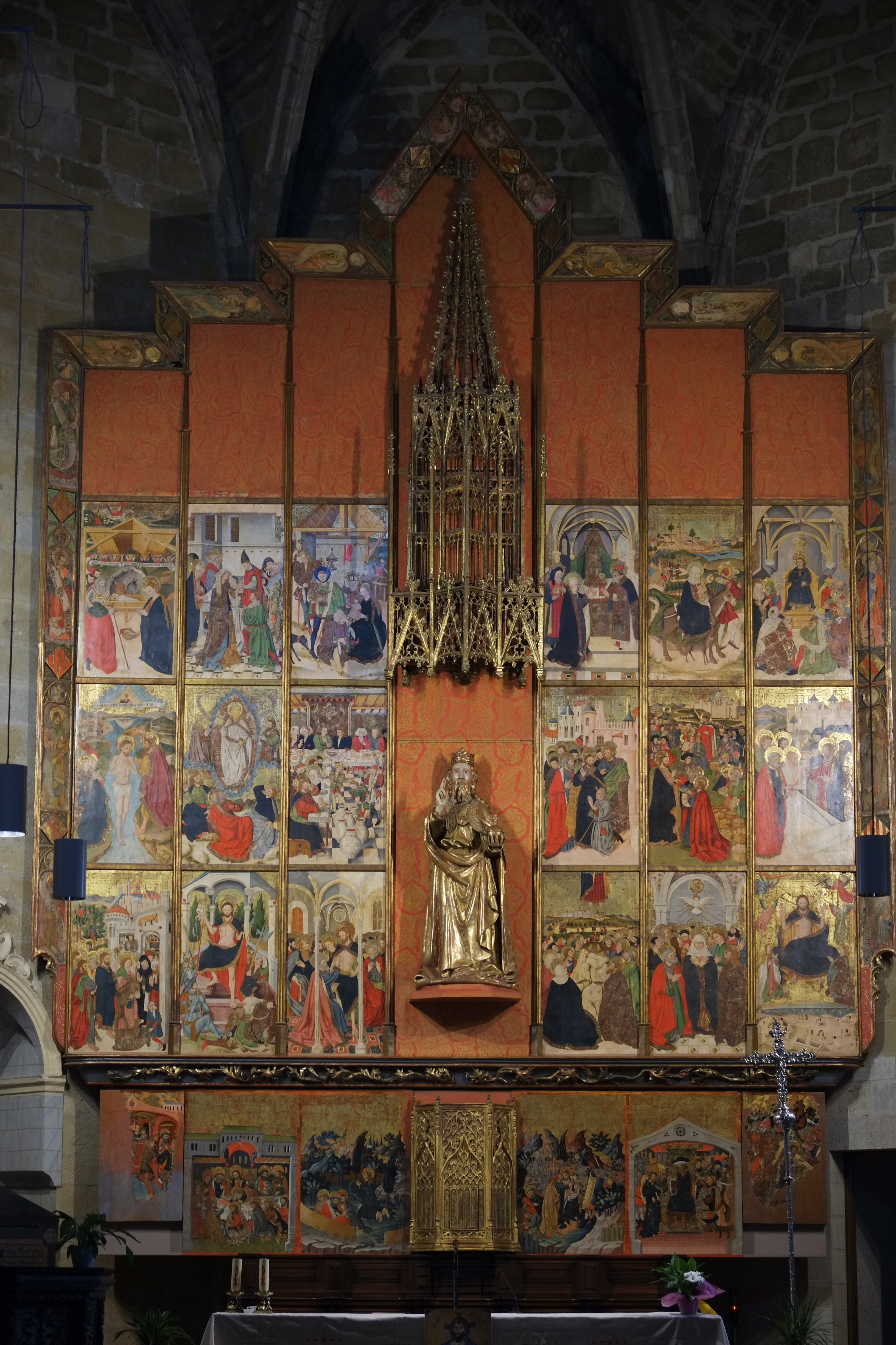 Kirche San Salvador in Ejea de los Caballeros in der spanischen Provinz Saragossa in Aragonien